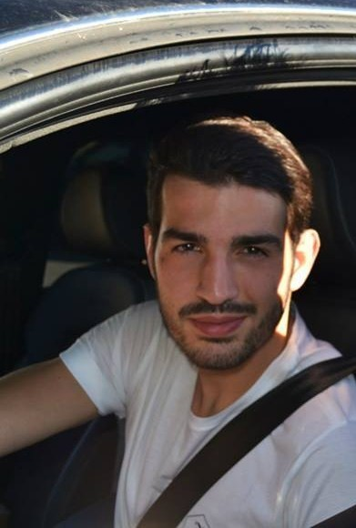 Opera propria